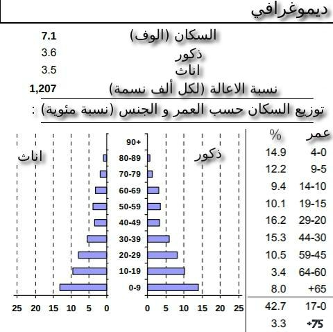 هرم سكاني لمستوطنة كريات أربعة الأسرائيلية. البيانات مأخوذة من الدائرة الأسرائيلية المركزية للأحصائيات. مترجم من النسخة العبرية. مصدر الصورة : صفحة كريات اربع العبرية في ويكيبيديا